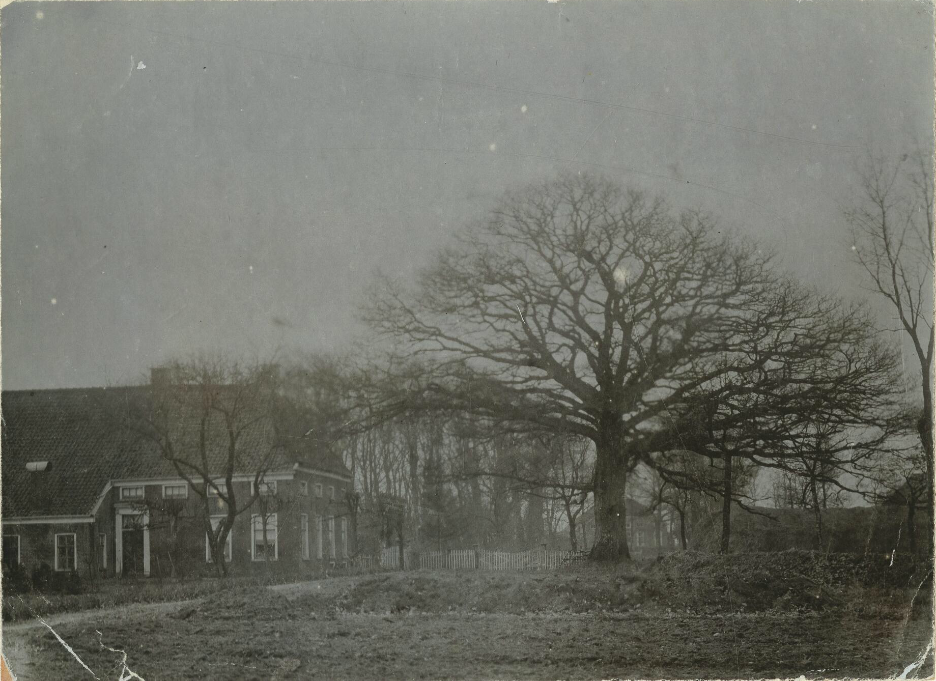 De dikste eik van Westerwolde begin 20e eeuw. Gekapt in 1975.